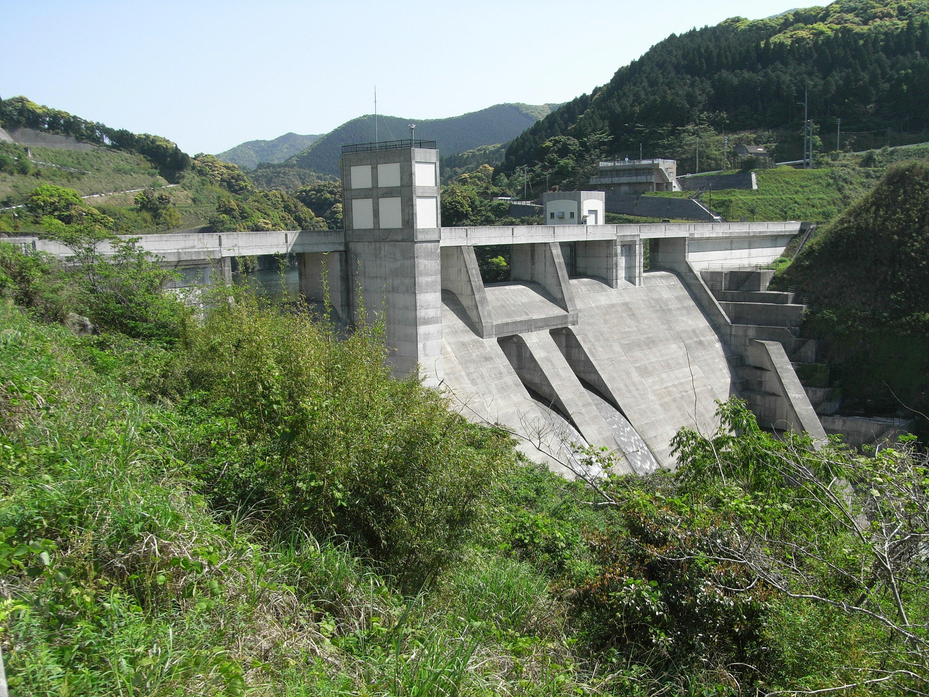 Dam